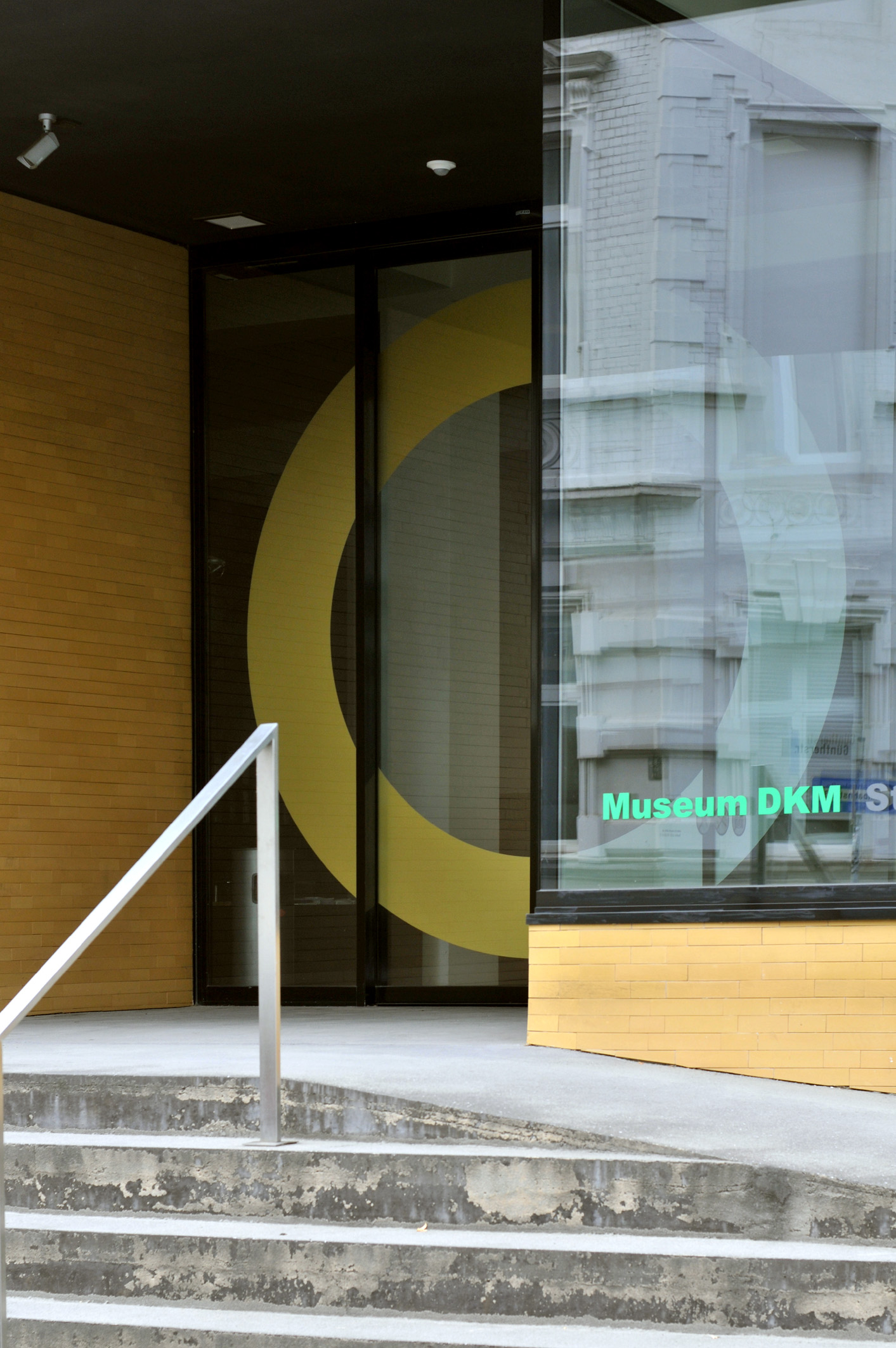 Museum DKM, Duisburg (Nordrhein-Westfalen, Deutschland)